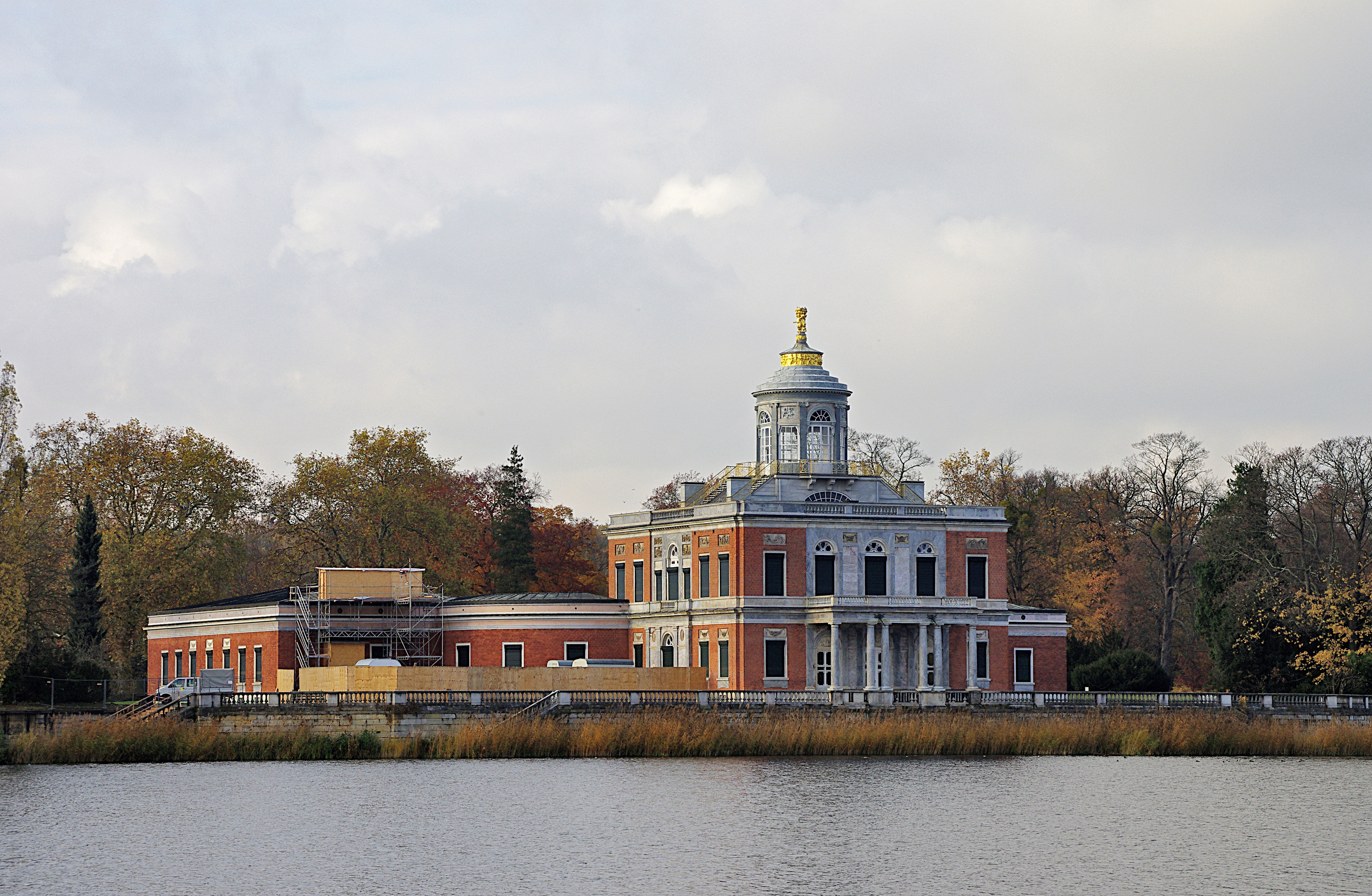 Potsdam in Brandenburg. Das Marmorpalais im Neuen Garten von der Straße Mühlenweg am gegenüberliegenden Ufer aus.